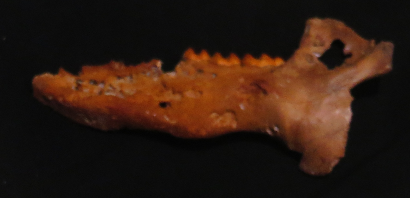 Fossil - Took the picture at Natural History Museum, Karlsruhe